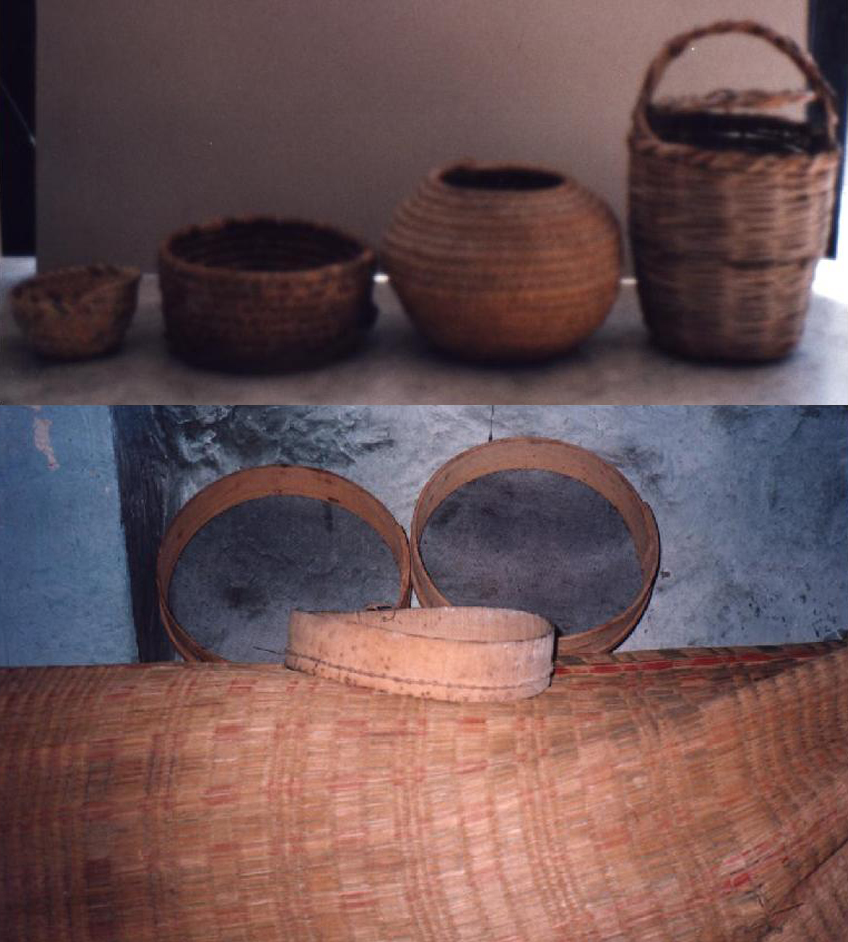 مناخل وغربال وسلال قش - أدوات قديمة كانت تستعملفي بلدة عبا - جنوب لبنان